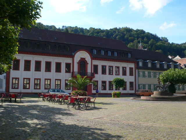 Grossherzogliches Palais, Heidelberg